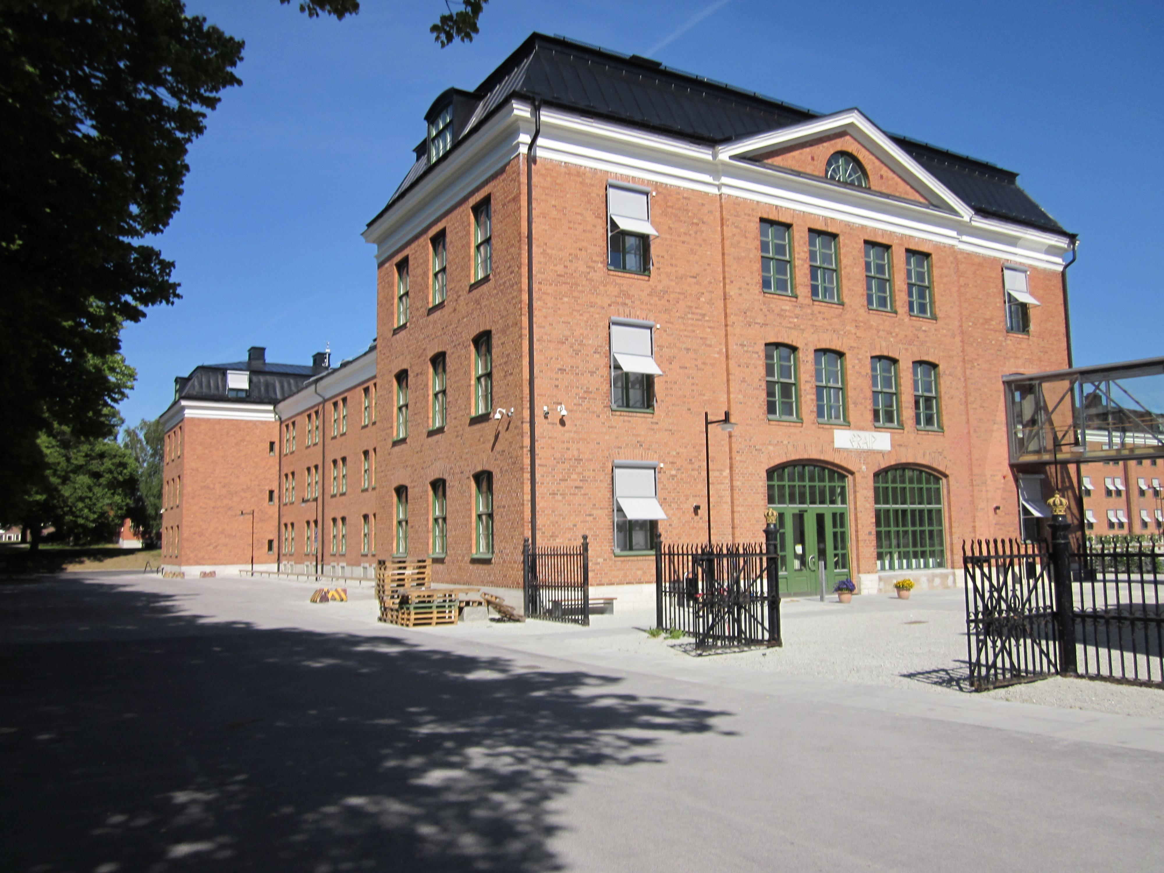 Kasern II "Graip" vid Gotlands regemente, P 18. Uppfört 1905.